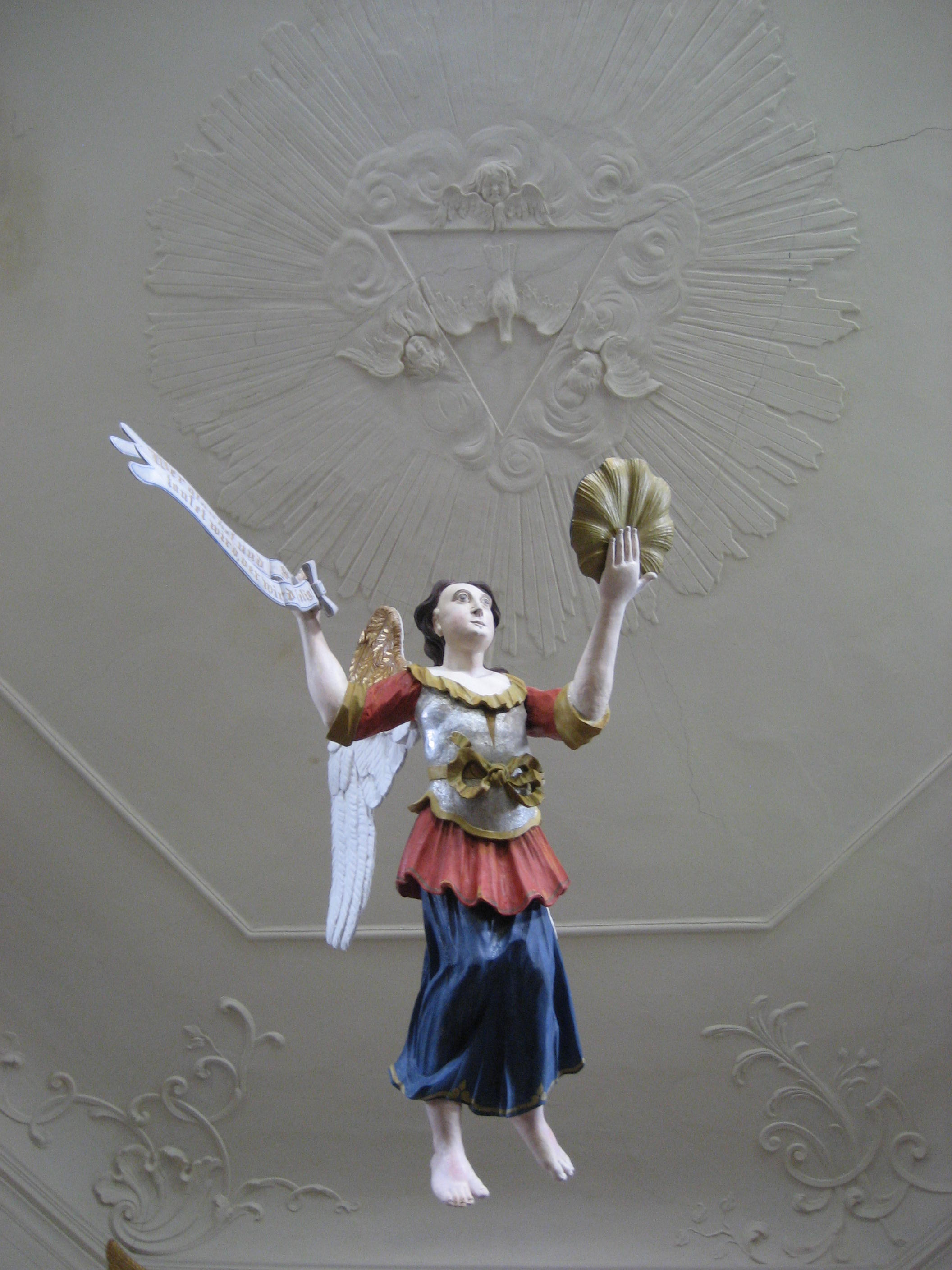 Taufengel Weisdin